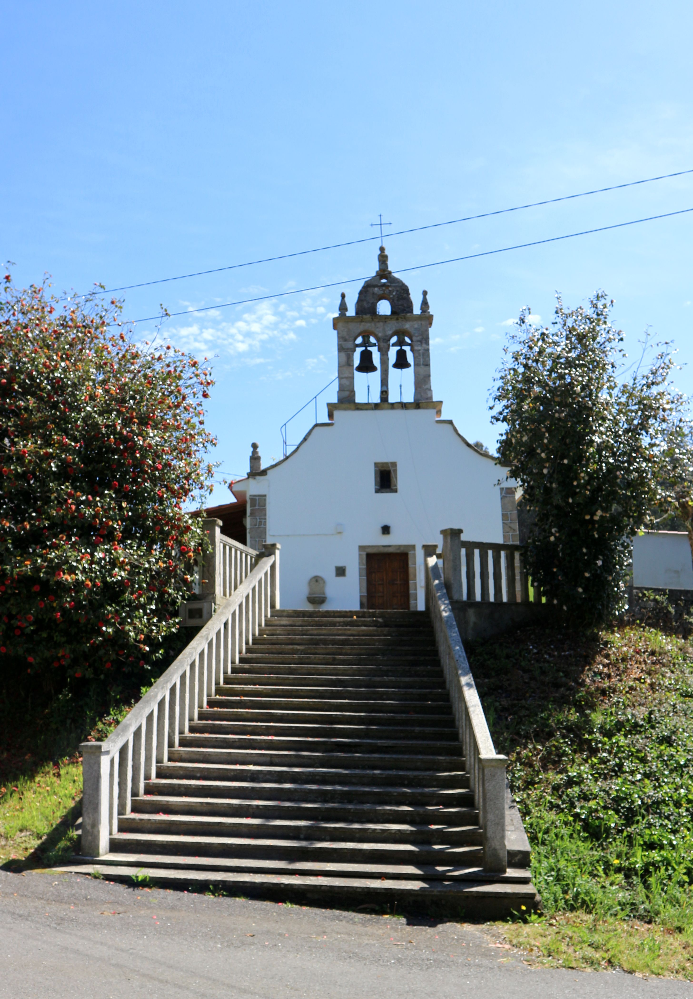 Igrexa de Santa María de Cutián. Cutián, Oza-Cesuras.